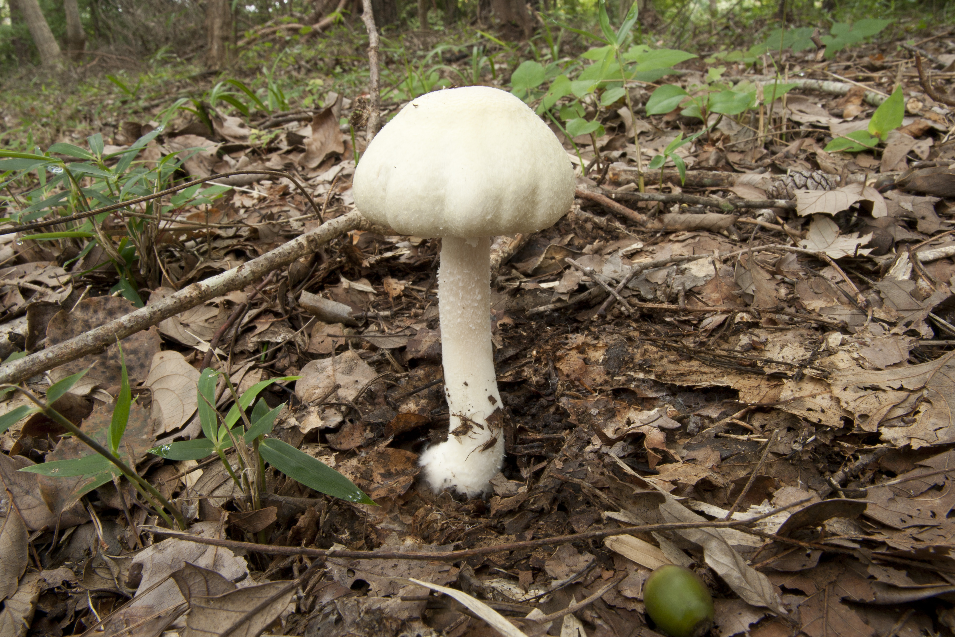 ウスキモリノカサ (学名：Agaricus abruptibulbus)